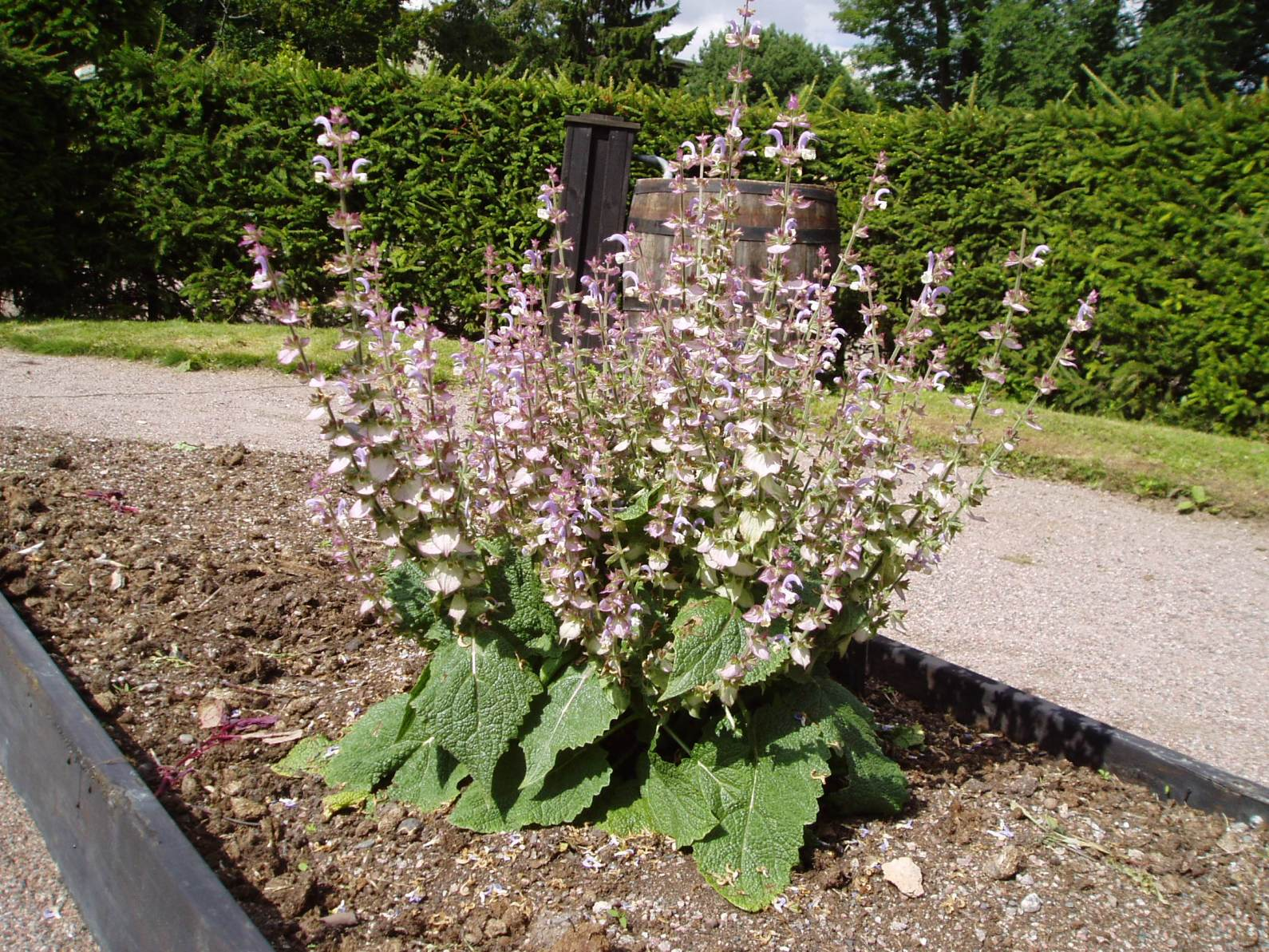 Salvia sclarea